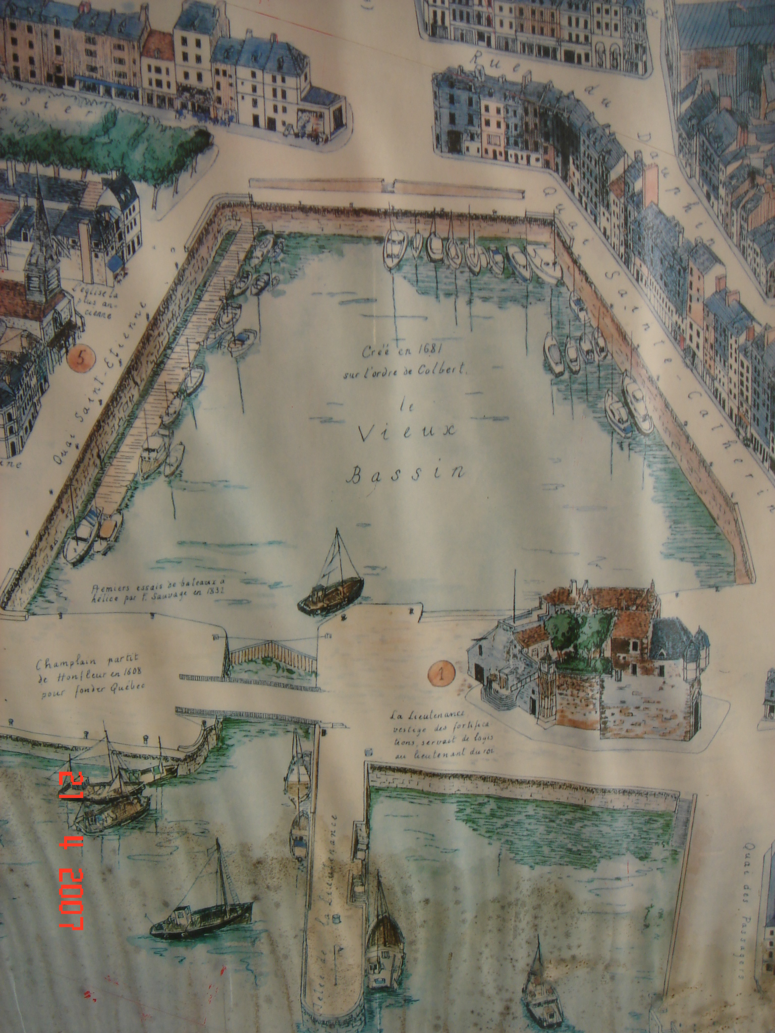 Honfleur le vieux bassin